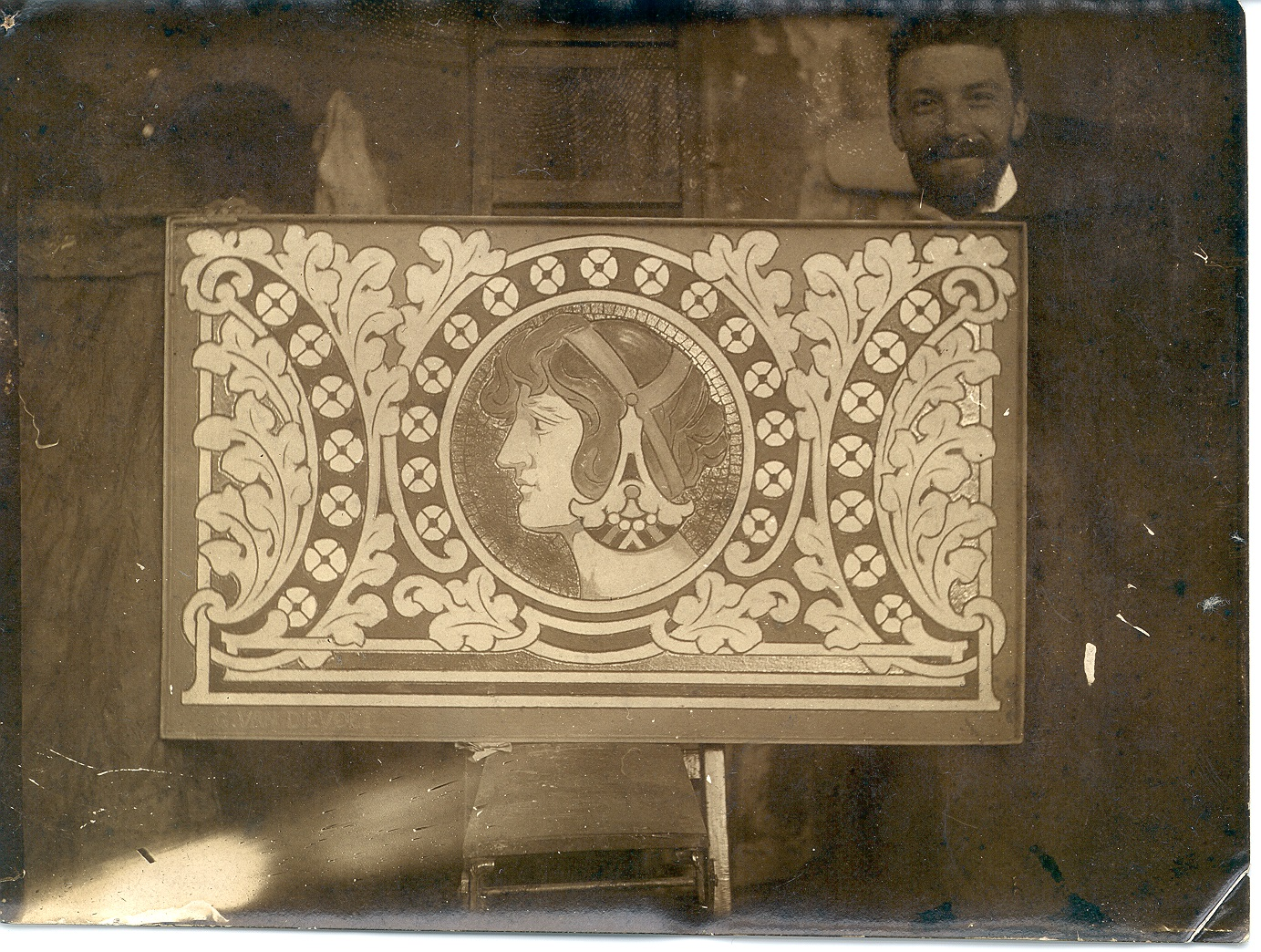 Le décorateur art-nouveau Gabriel VAN DIEVOET devant un projet de sgraffito dans son atelier du 91 rue Souveraine à Ixelles, photo prise le 25 août 1904